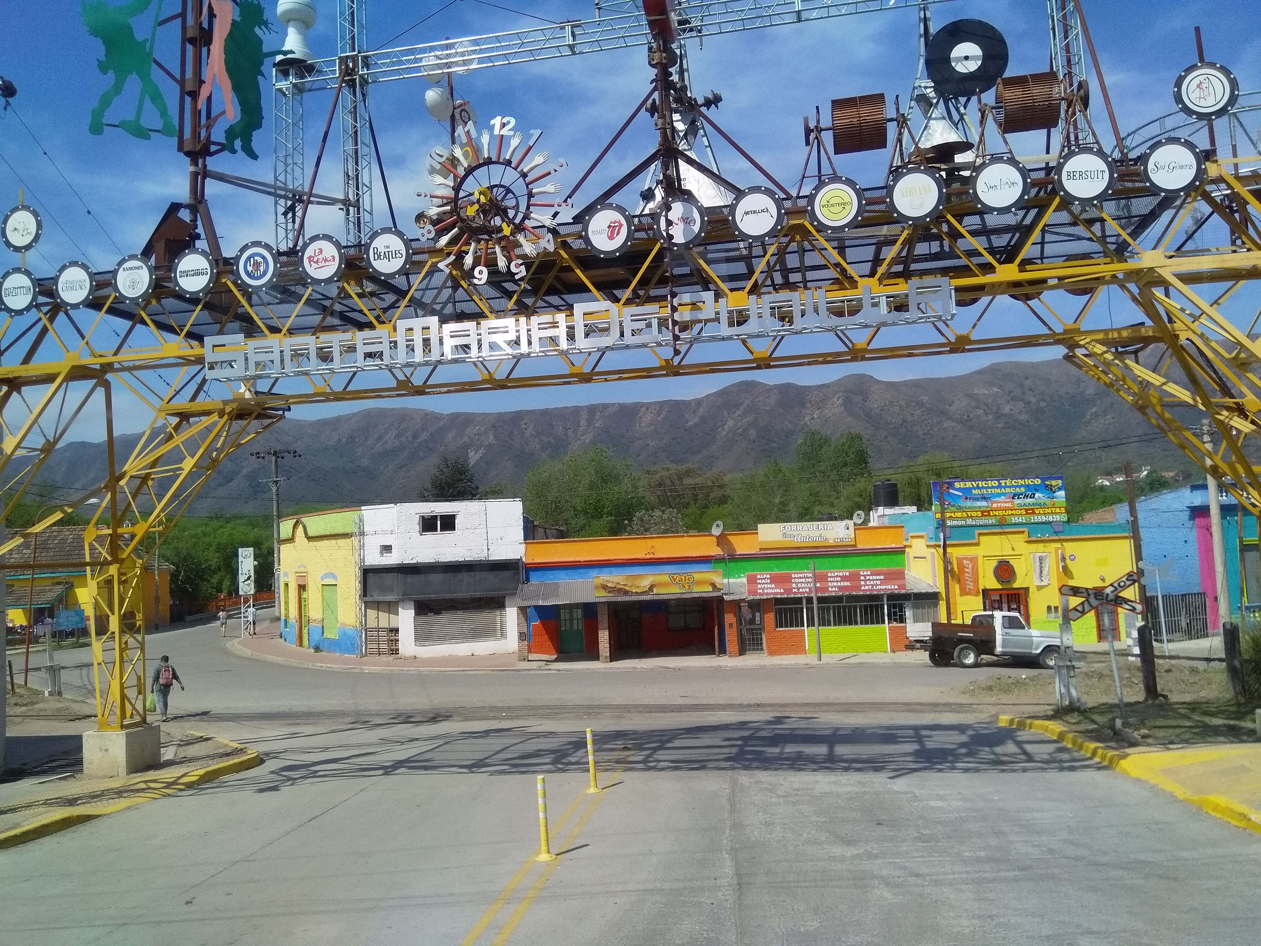 Ingreso al Cosquin Rock, Santa María de Punilla, Córdoba, Argentina desde la ruta nacional 38